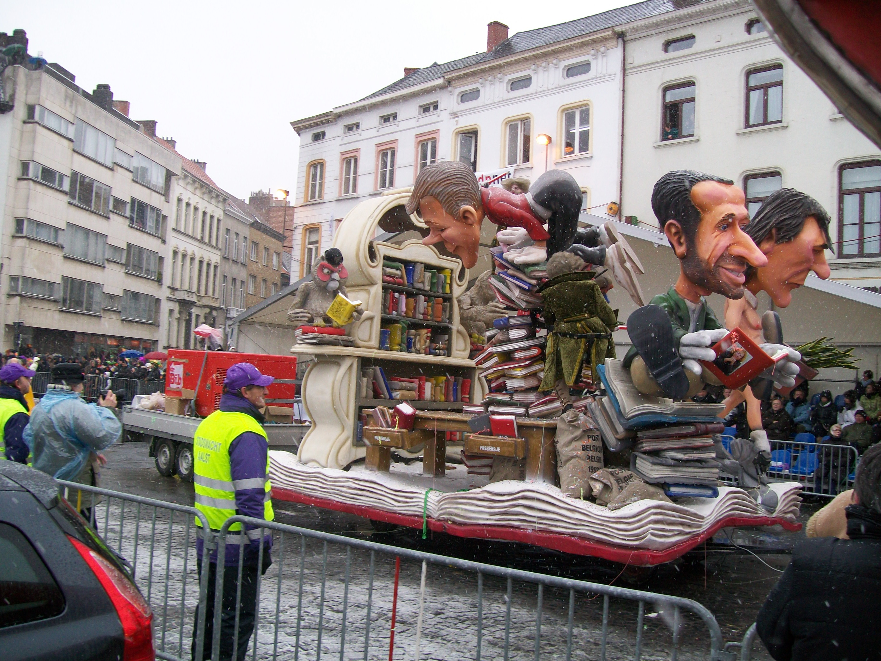 Carnavalsvereniging "Possensje" 2010